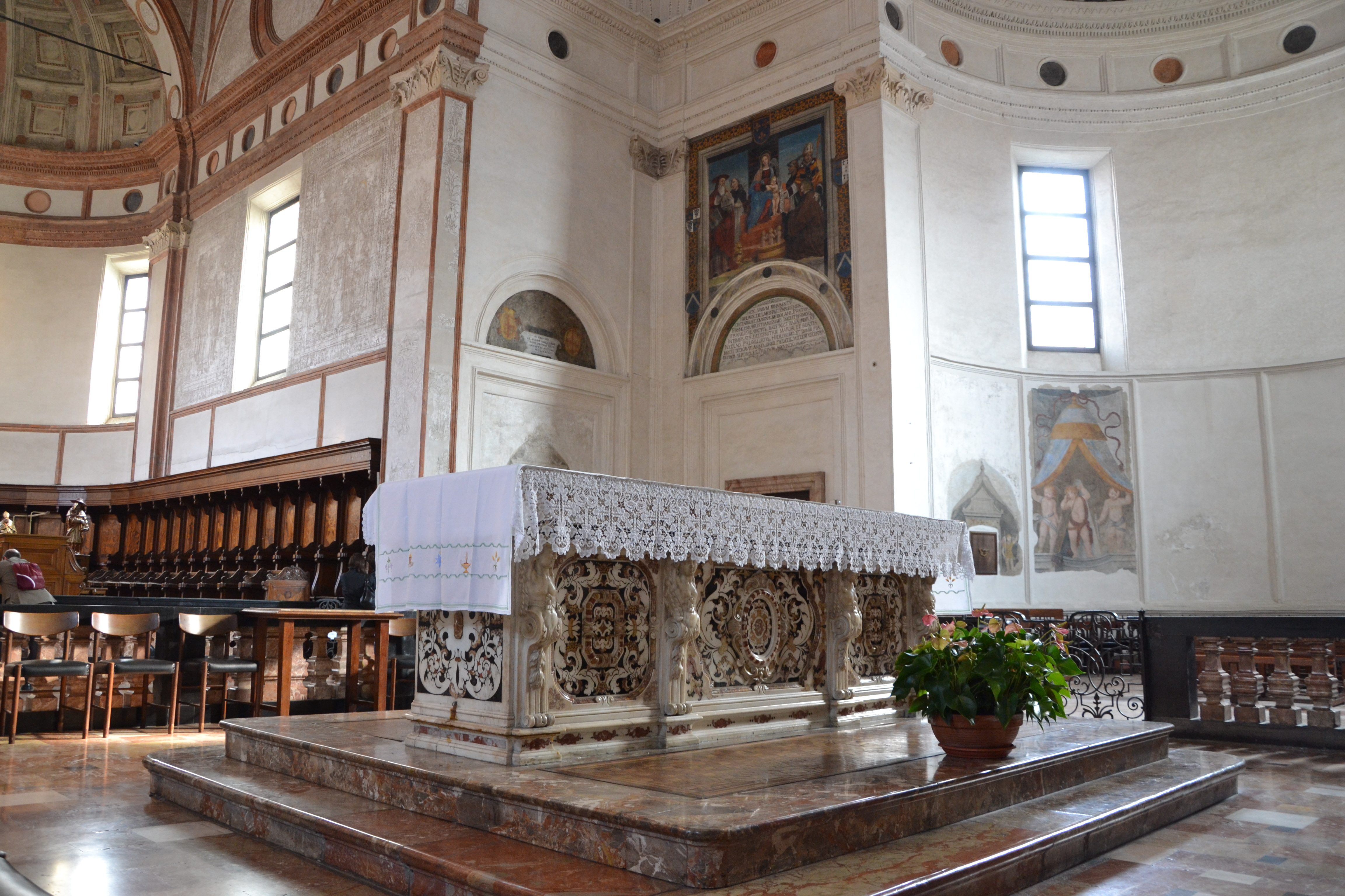 interno della Tribuna Bramantesca, Santa Maria delle Grazie (Milan)